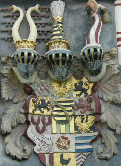 Wappen des Herzogtums Coburg-Sachsen und Gotha am Stadthaus gegenüber dem Rathaus von Coburg